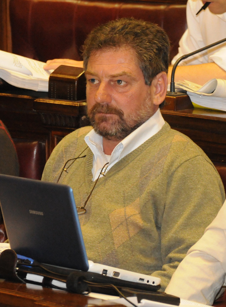 Parlamento Uruguayo